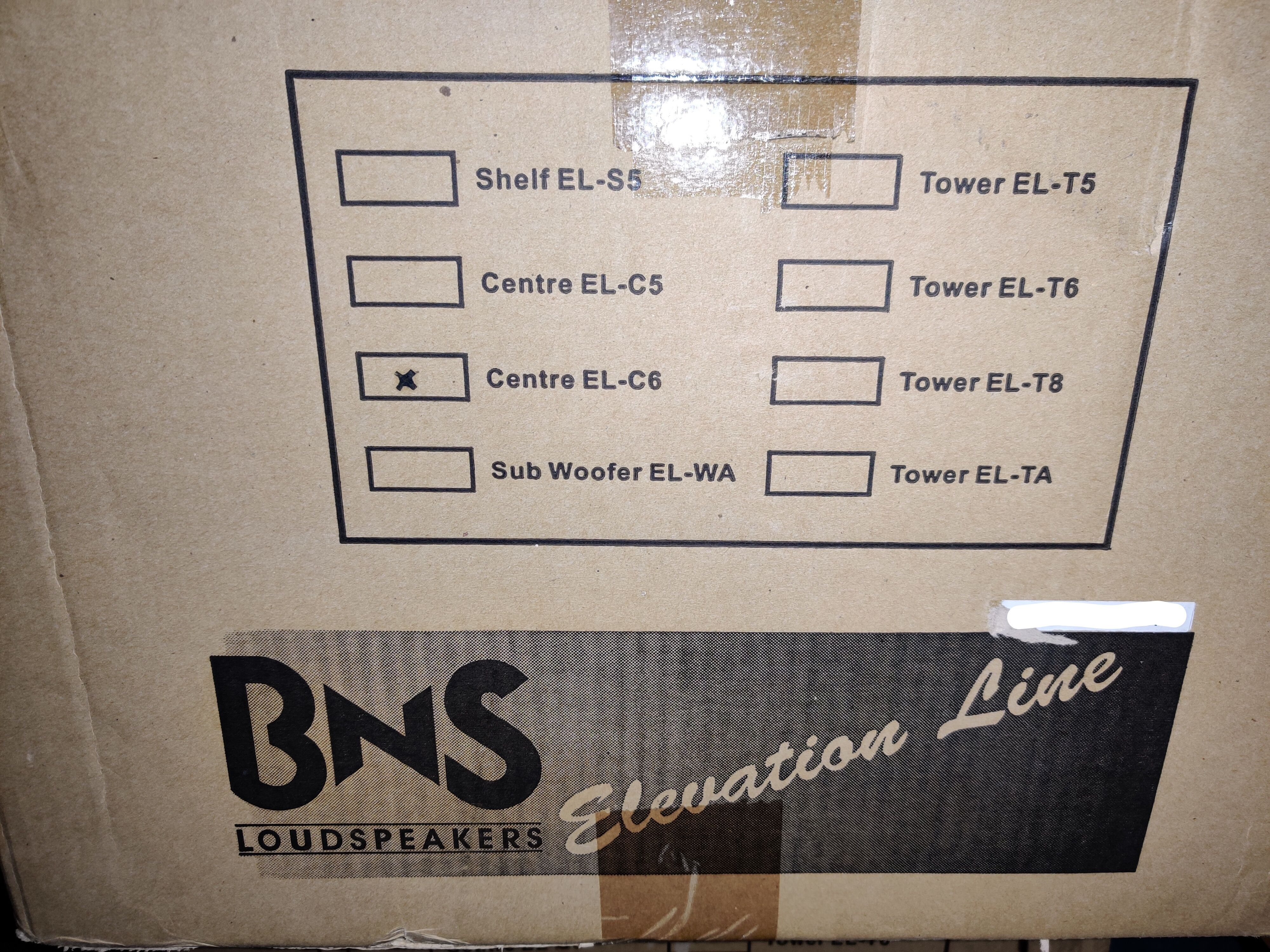 De officiële BNS Elevation doos, met daarop de EL-S5 beschreven.